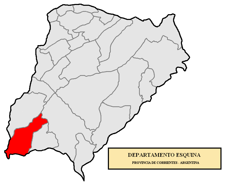 Localización del Departamento Esquina en la provincia de Corrientes, Argentina Localización del Departamento Esquina, en la provincia de Corrientes, Argentina.